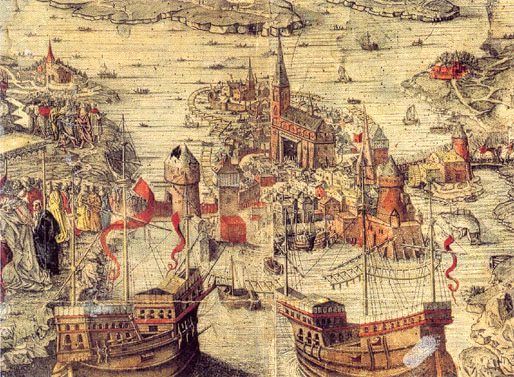 Blodbadstavlan